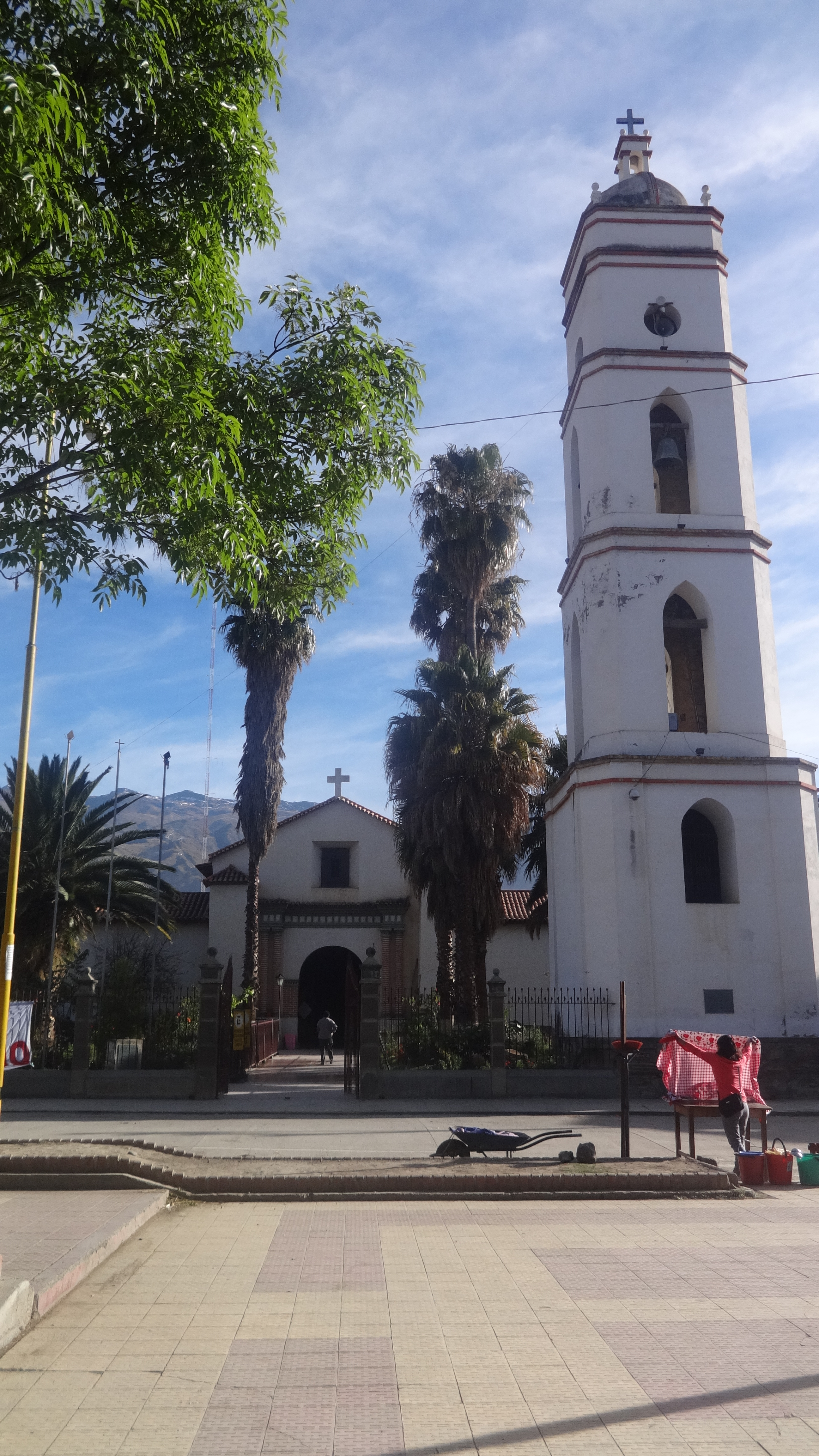 La torre del templodl Paso con mas de 400 anios.